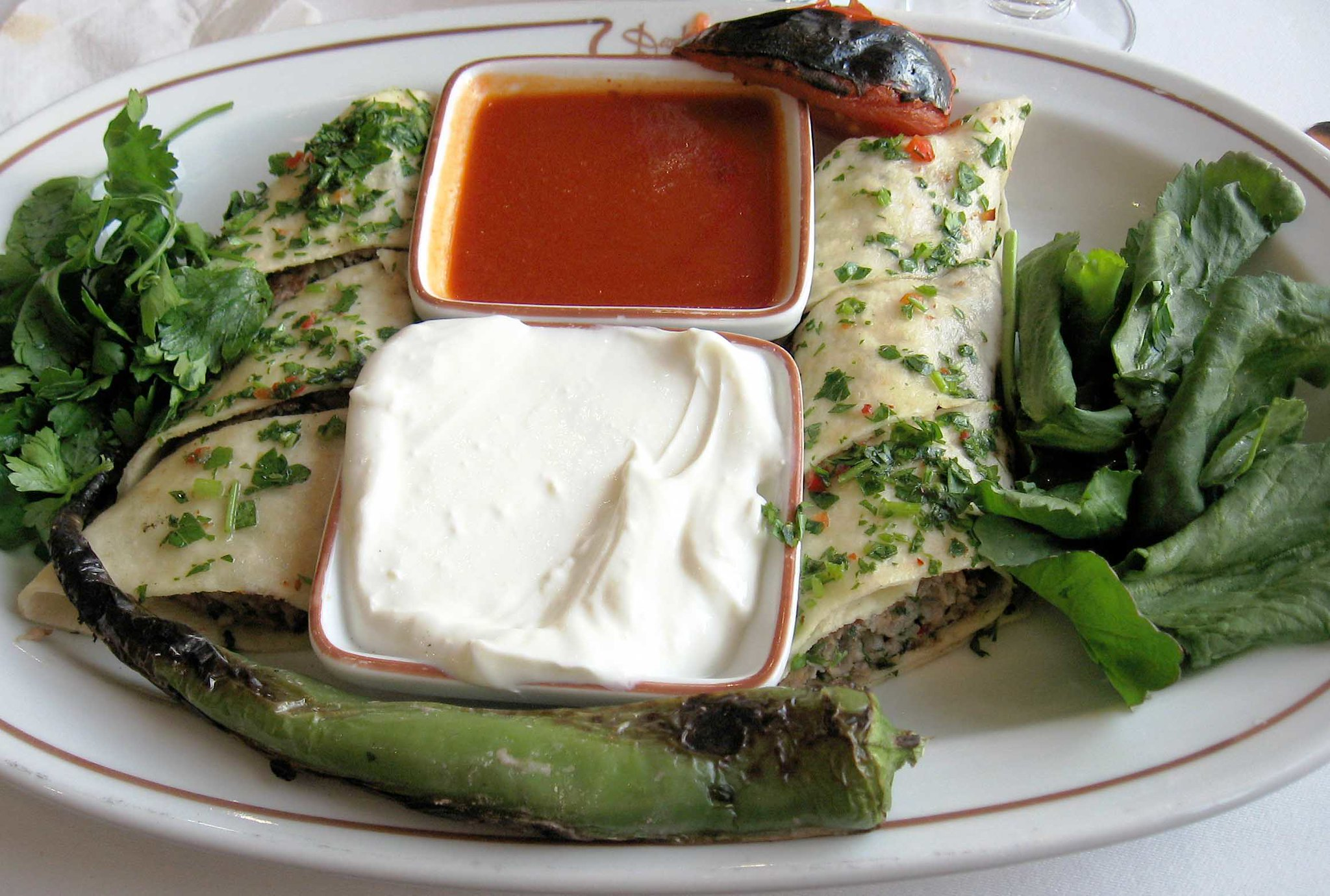 Develi, Kalam?? Marina, ?stanbul my favourite kebap!!